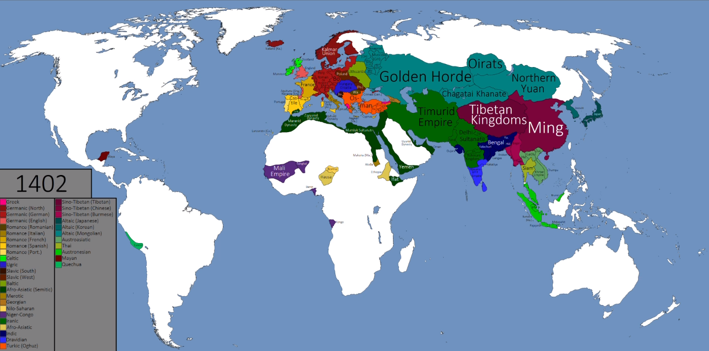 Planisphère des peuples à la fin du XIVème siècle